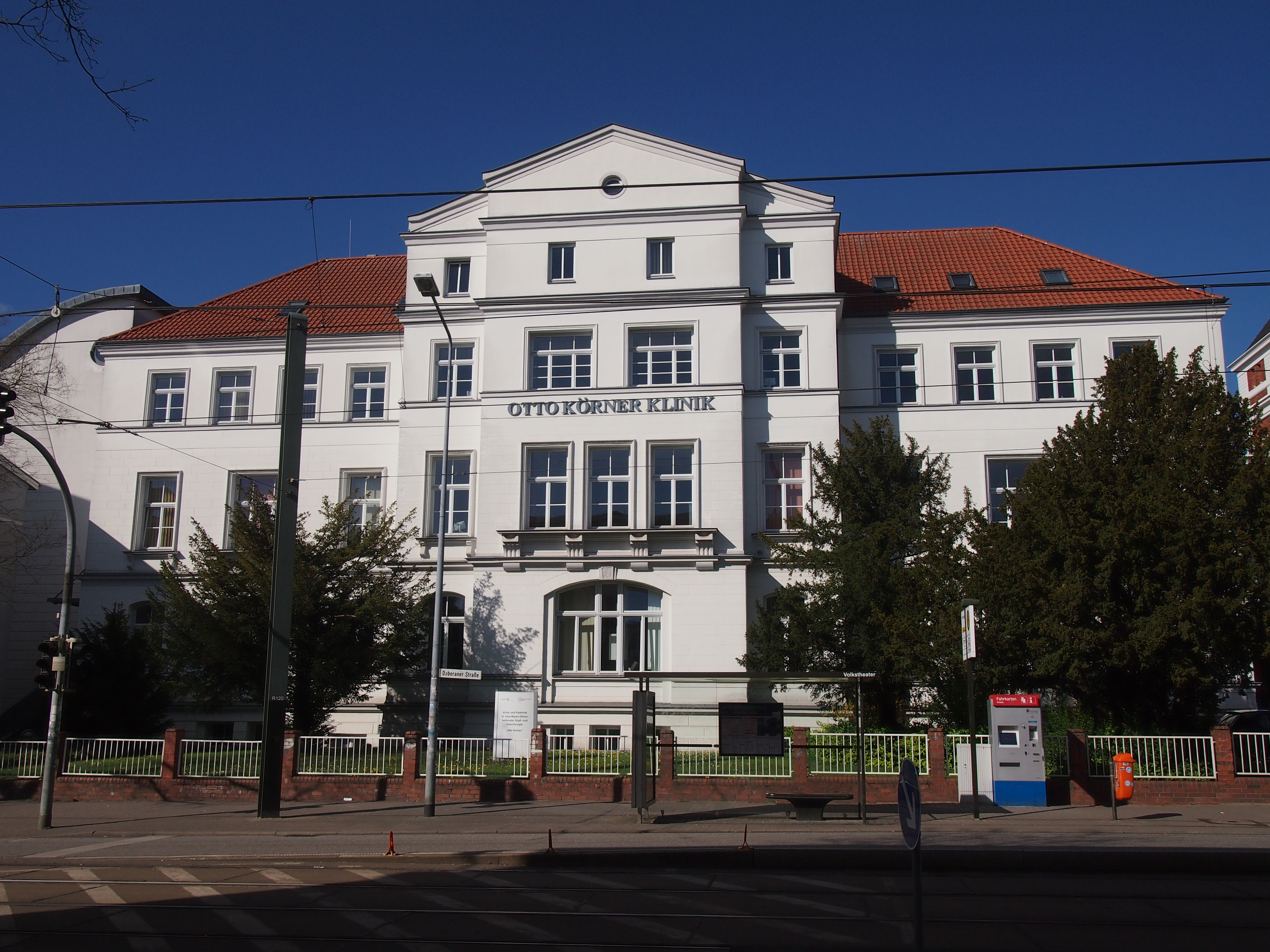 Klinik und Poliklinik für Hals-, Nasen-, Ohrenheilkunde, Kopf- und Halschirurgie "Otto Körner" der Universitätsmedizin Rostock, Doberaner Straße 137-139, 18057 Rostock